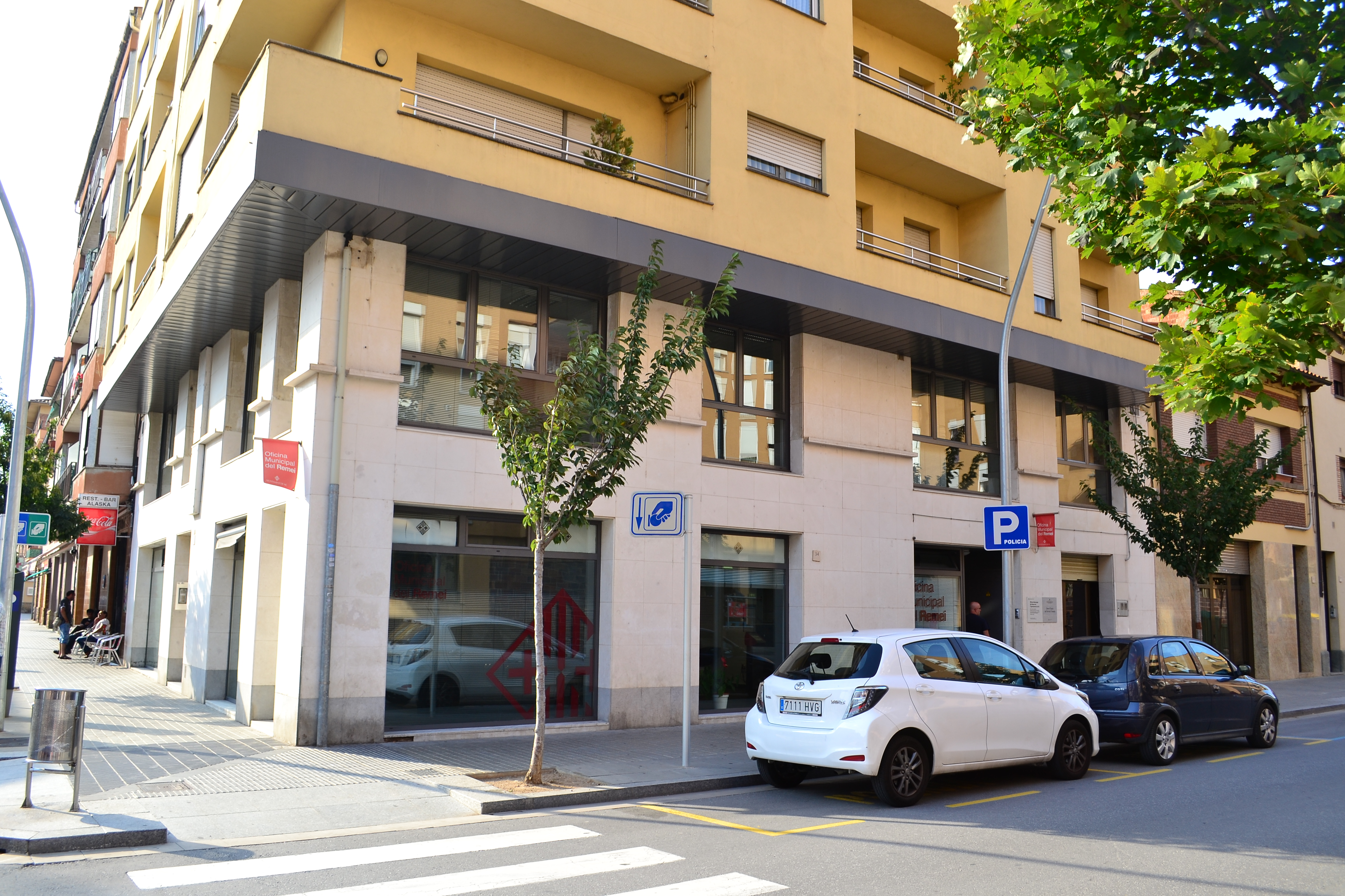 Oficina municipal de Vic descentralitzada a el barri del Remei